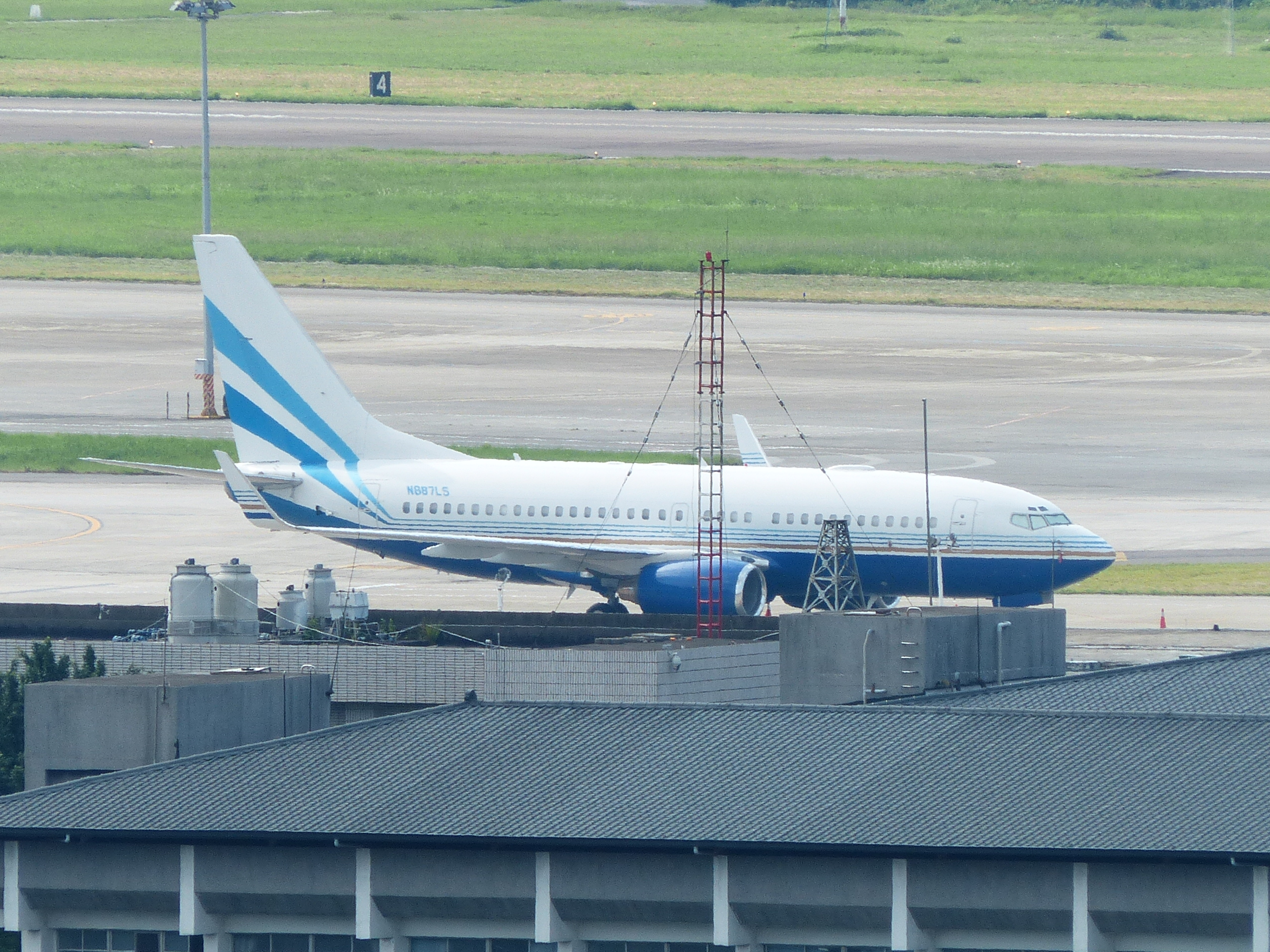 停放臺北松山機場的拉斯維加斯金沙賭場（Las Vegas Sands）專機波音737-700 N887LS。